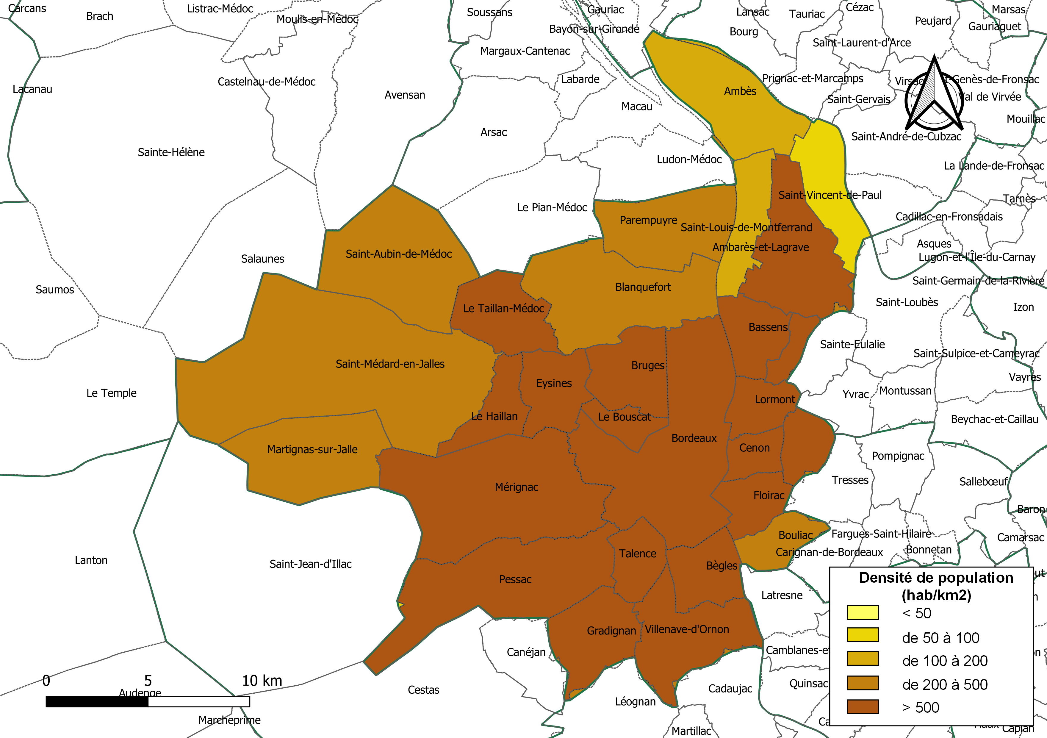 Carte des densités de population (millésimée 2016) des communes de la communauté de communes l'intercommunalité Bordeaux Métropole, département de la Gironde, France. Composition au 1er janvier 2019.